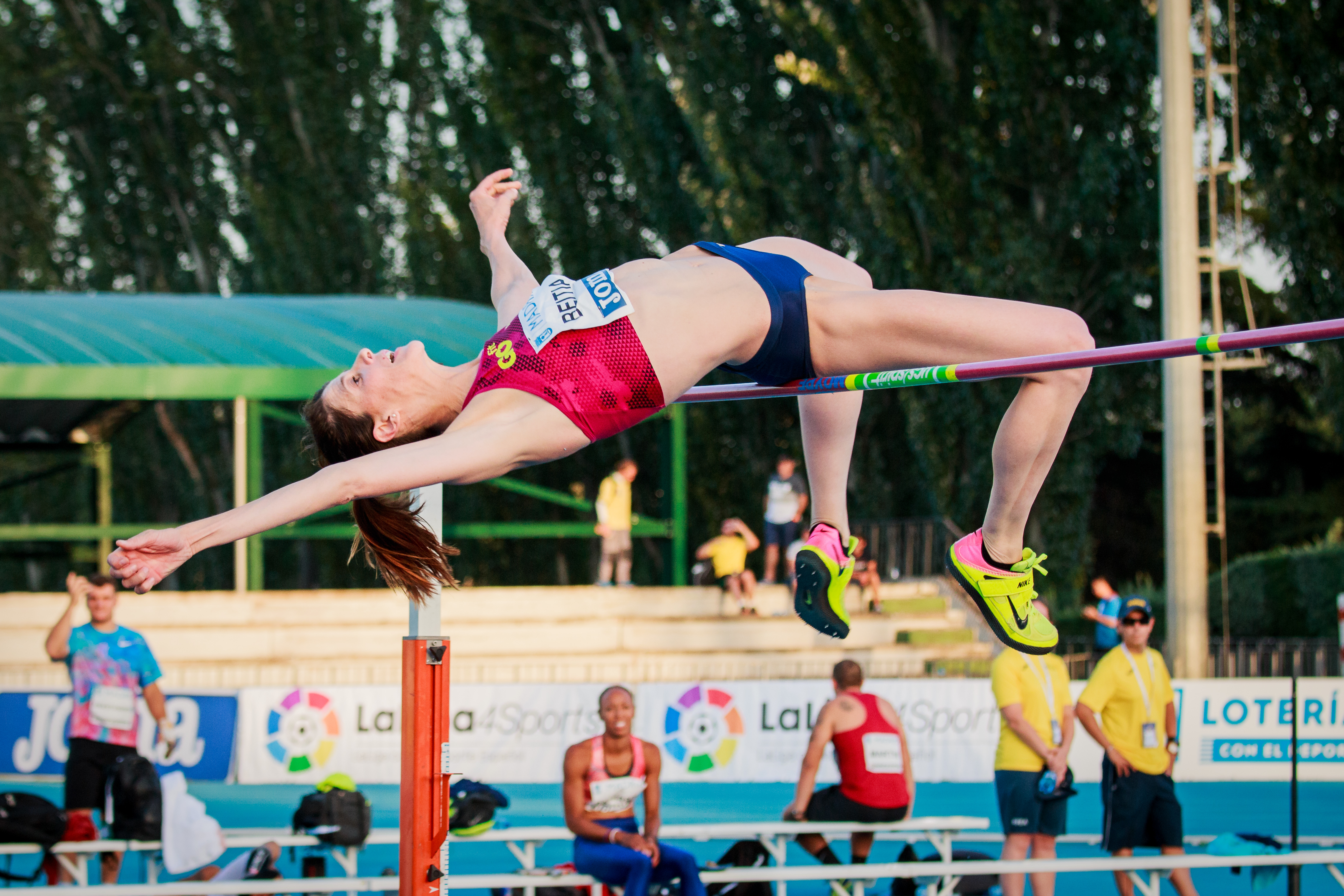 Ruth Beitia (ESP). Salto en alto. IAAF World Challenge. Meeting Madrid 2017. Moratalaz, Madrid.